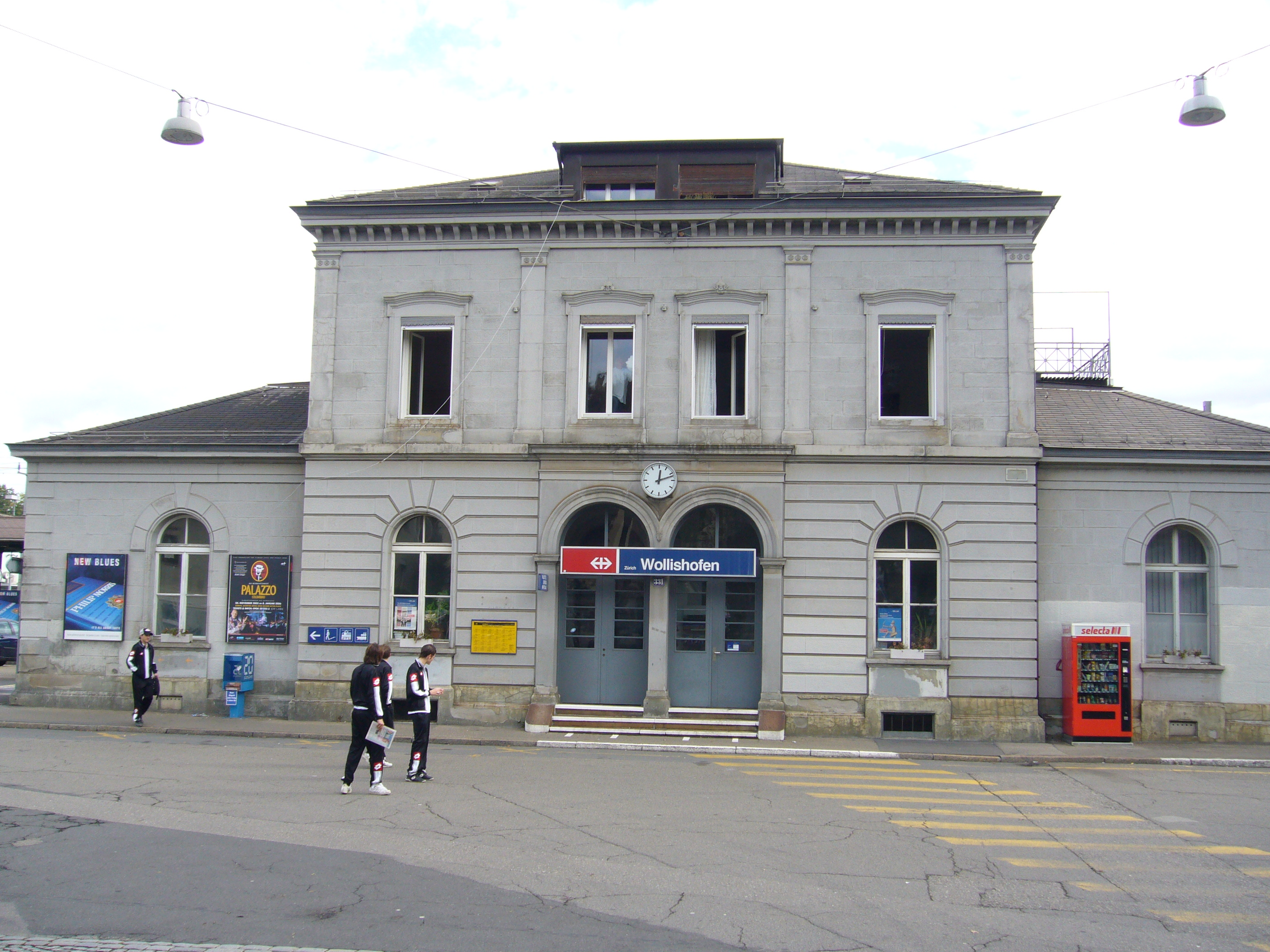 Bahnhof Wollishofen von Westen